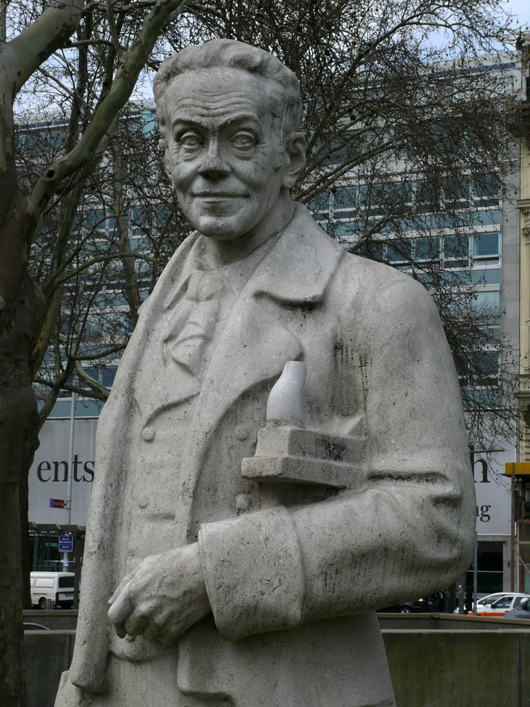 Alexander Girardi Denkmal am Karlsplatz in Wien